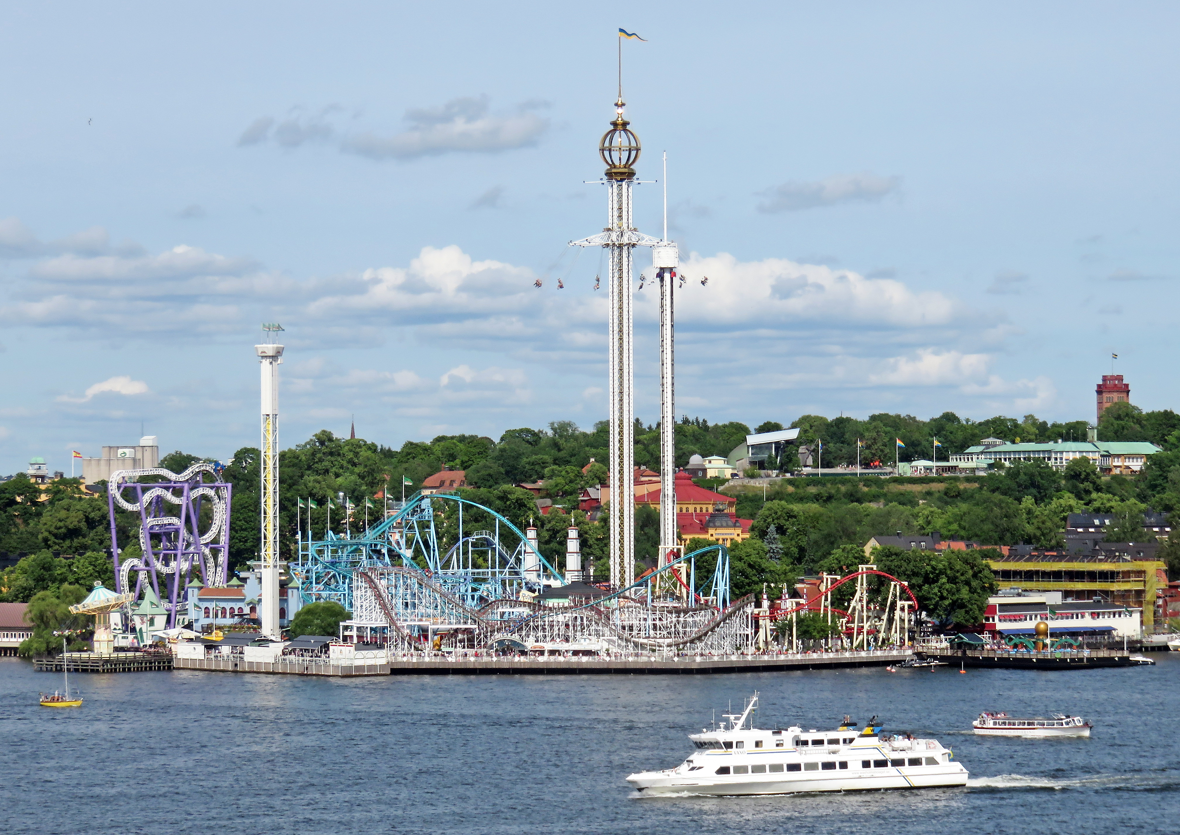 Gröna Lund från Fjällgatan